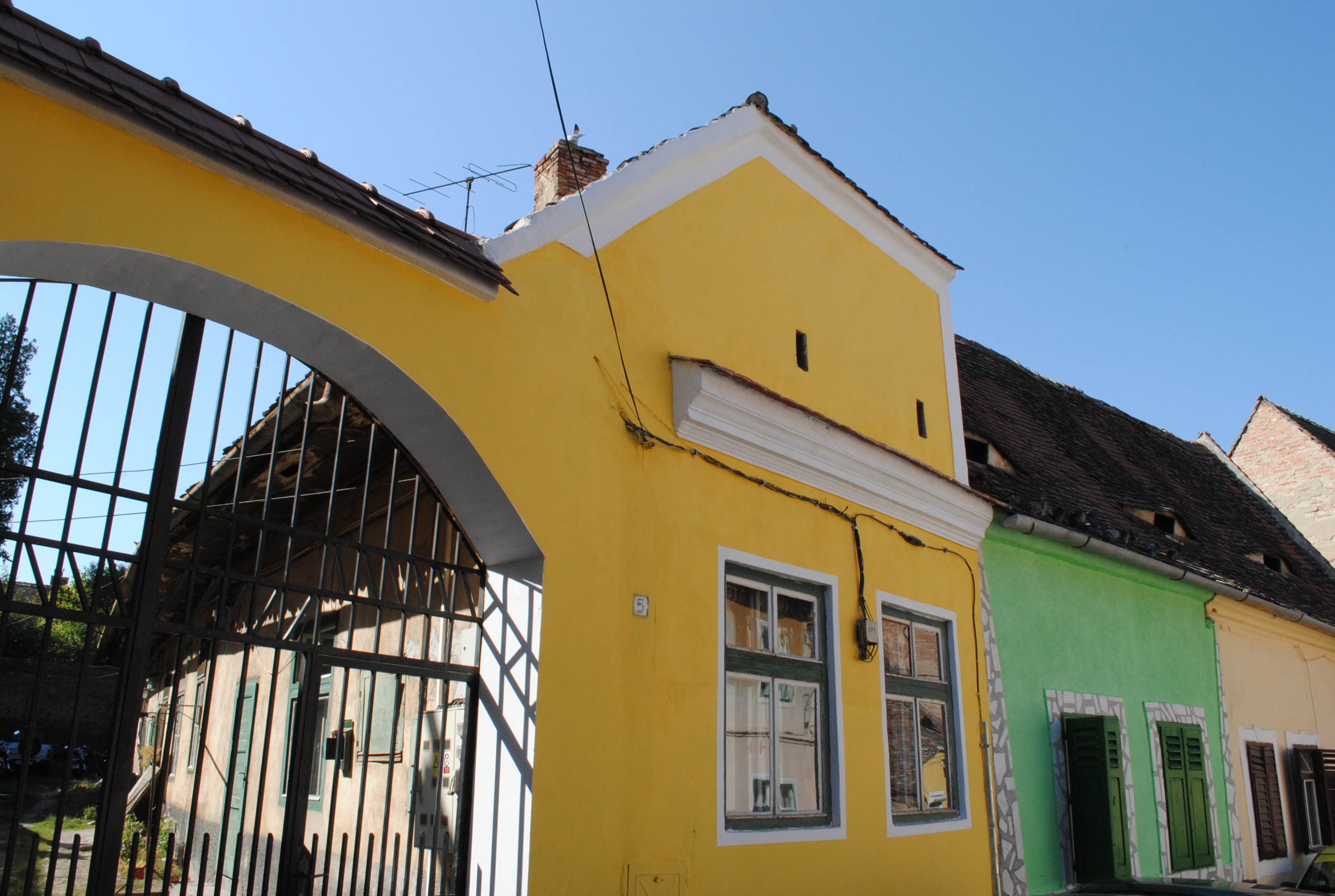 Casă, sec. XVI, sec. XVIII